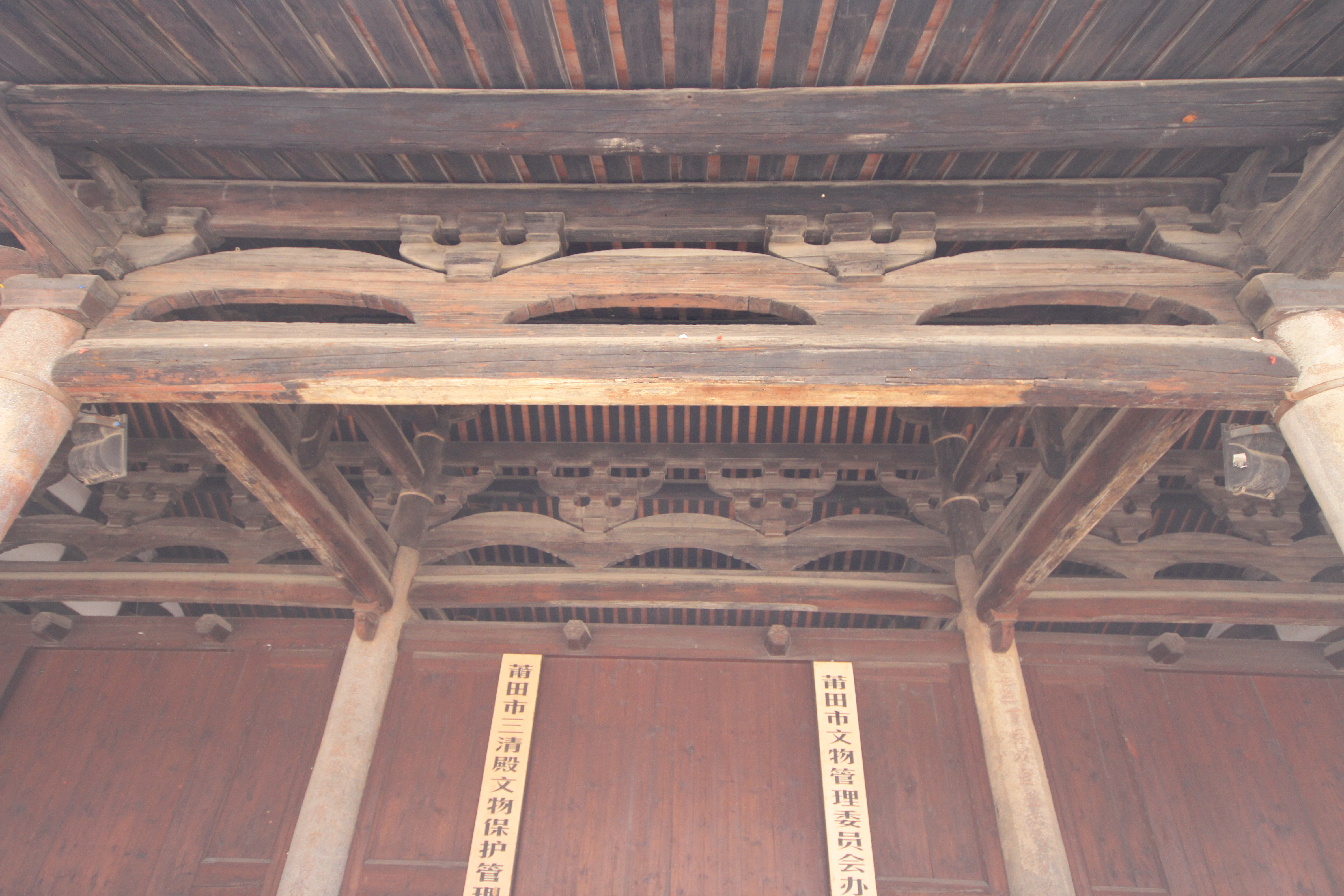 元妙观山门，位于中国福建省莆田市